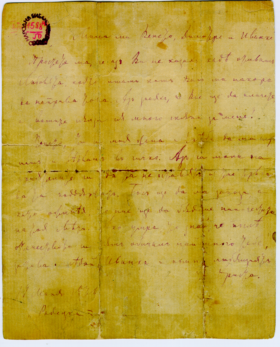 Прощальное письмо Христо Ботева написано на пароходе"Радецки"